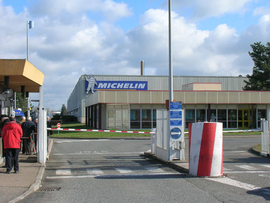 Usine Michelin Roanne